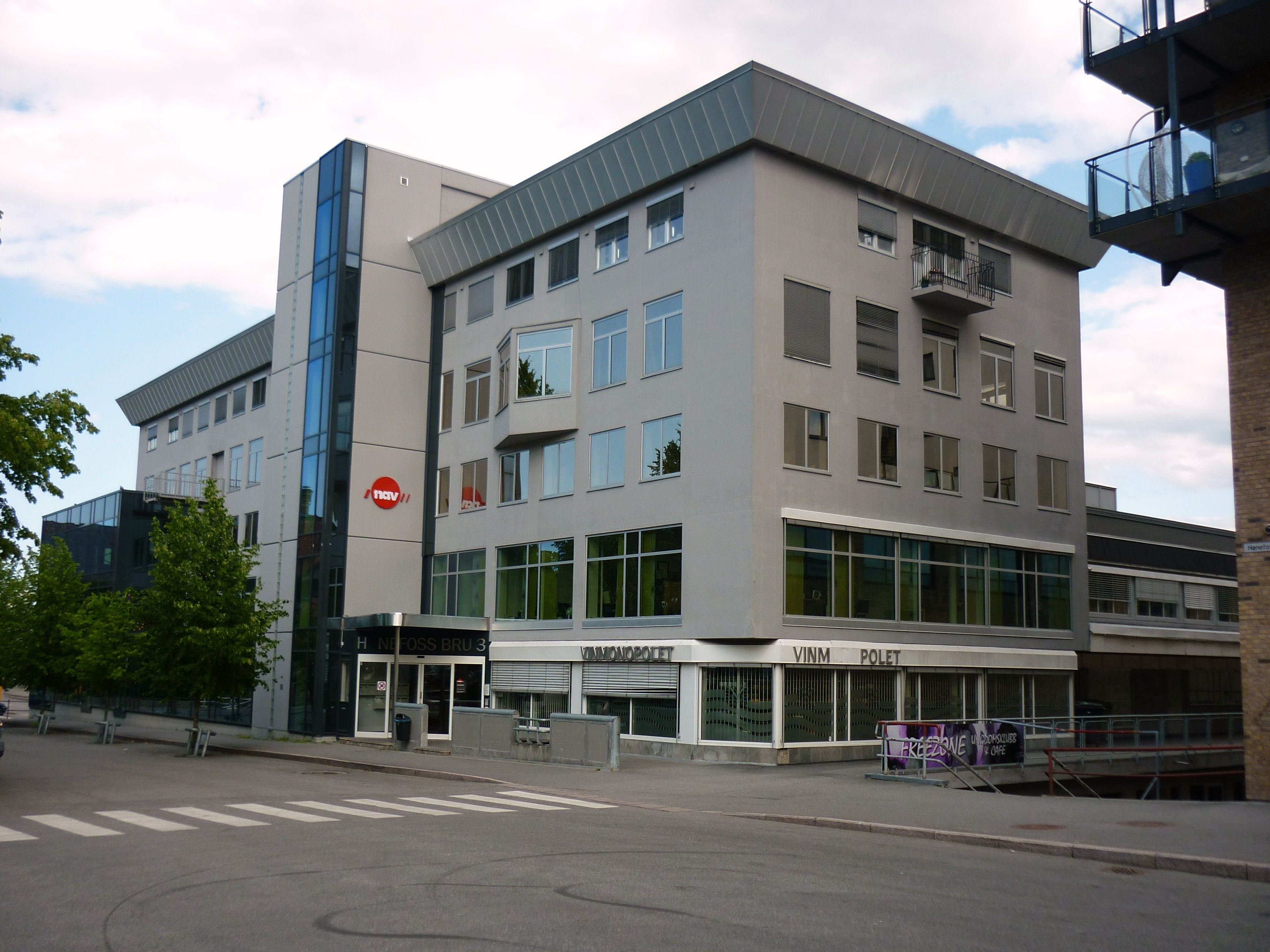 Et næringsbygg i Hønefoss, som blant annet huser NAV, Vinmonopolet og Byscenen.